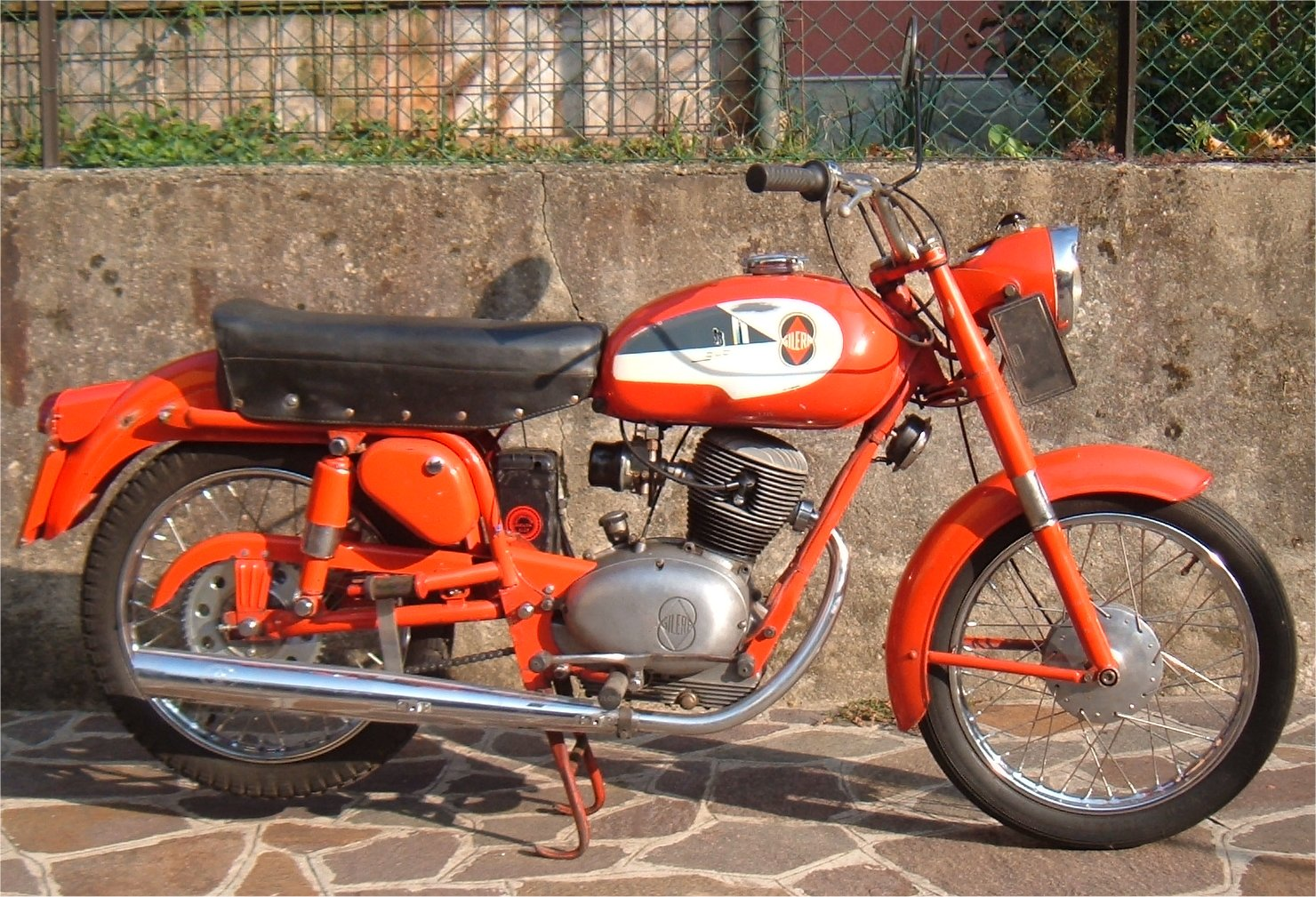 Gilera Giubileo 98 Extra del 1959